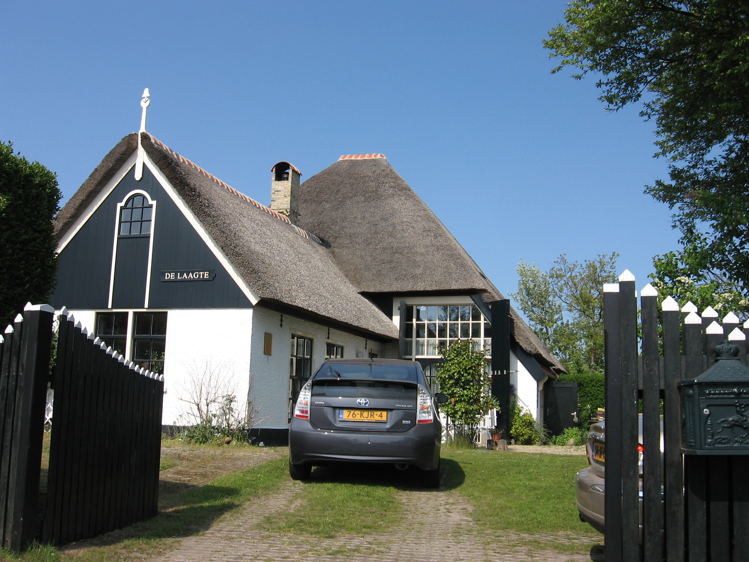 Den Burg - Hallerweg 55.jpg